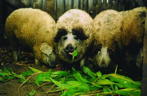 Mangalica, Hungary